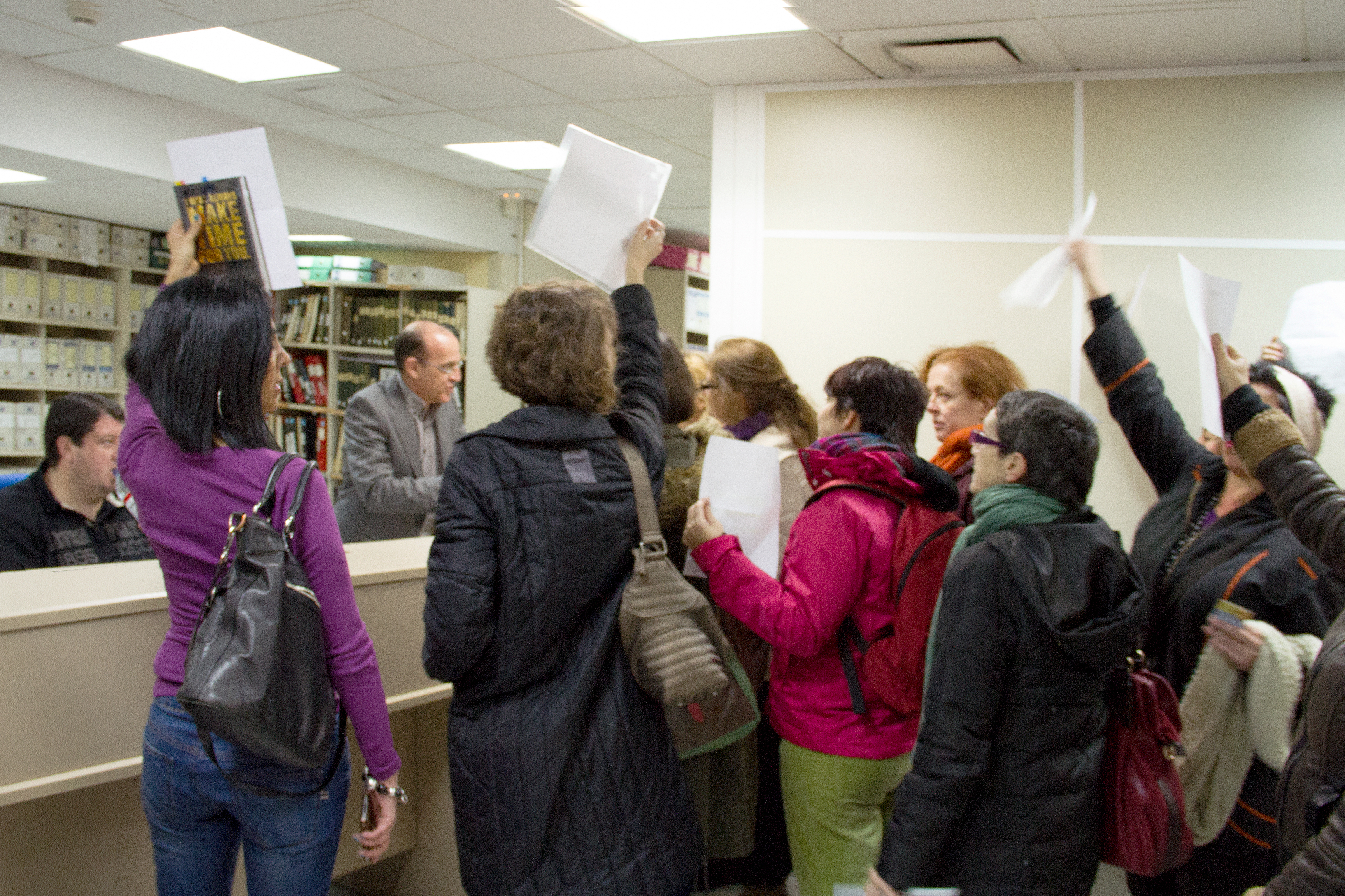 Escena de la acción colectiva "Registro"